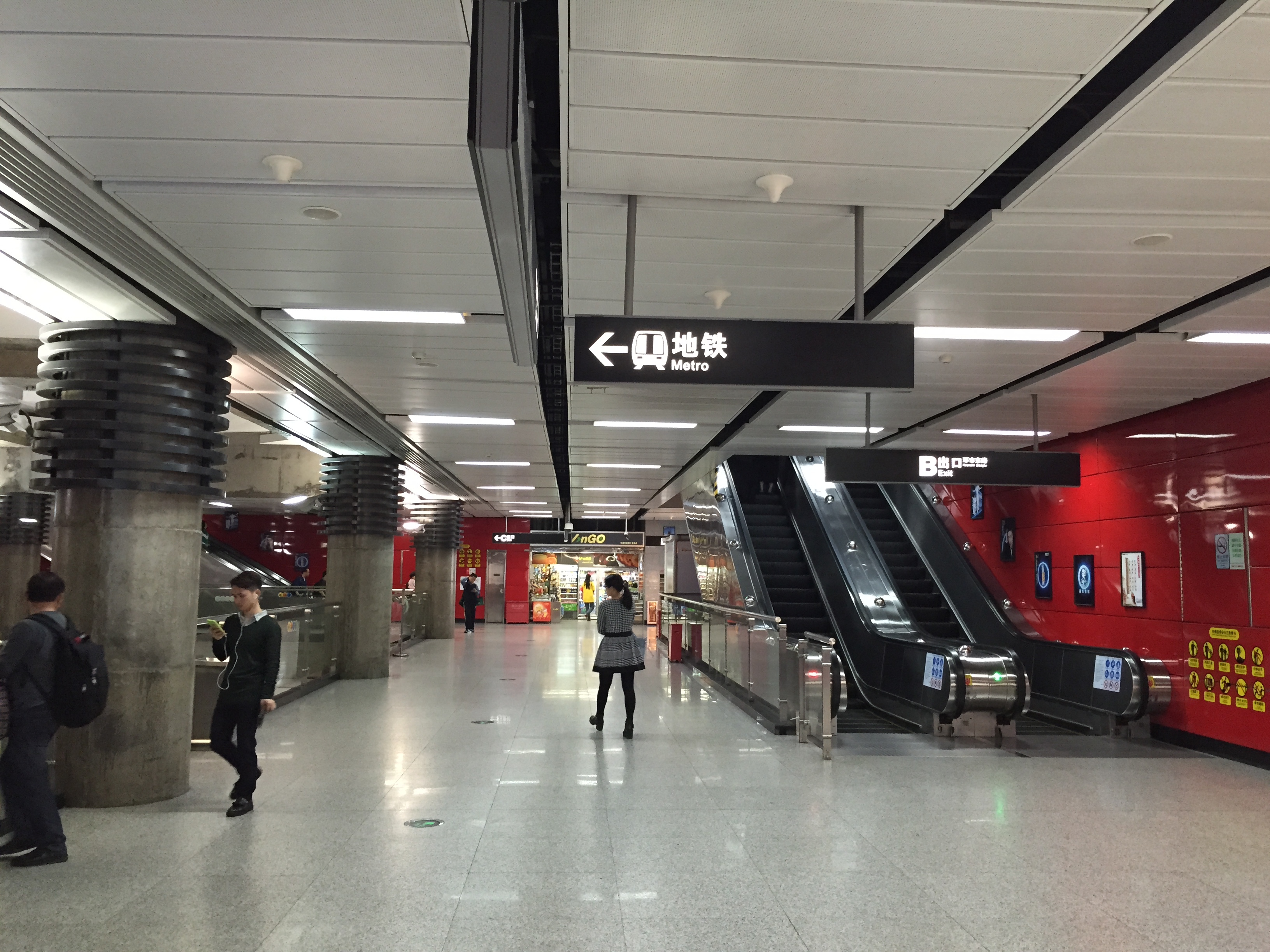 广州地铁动物园站